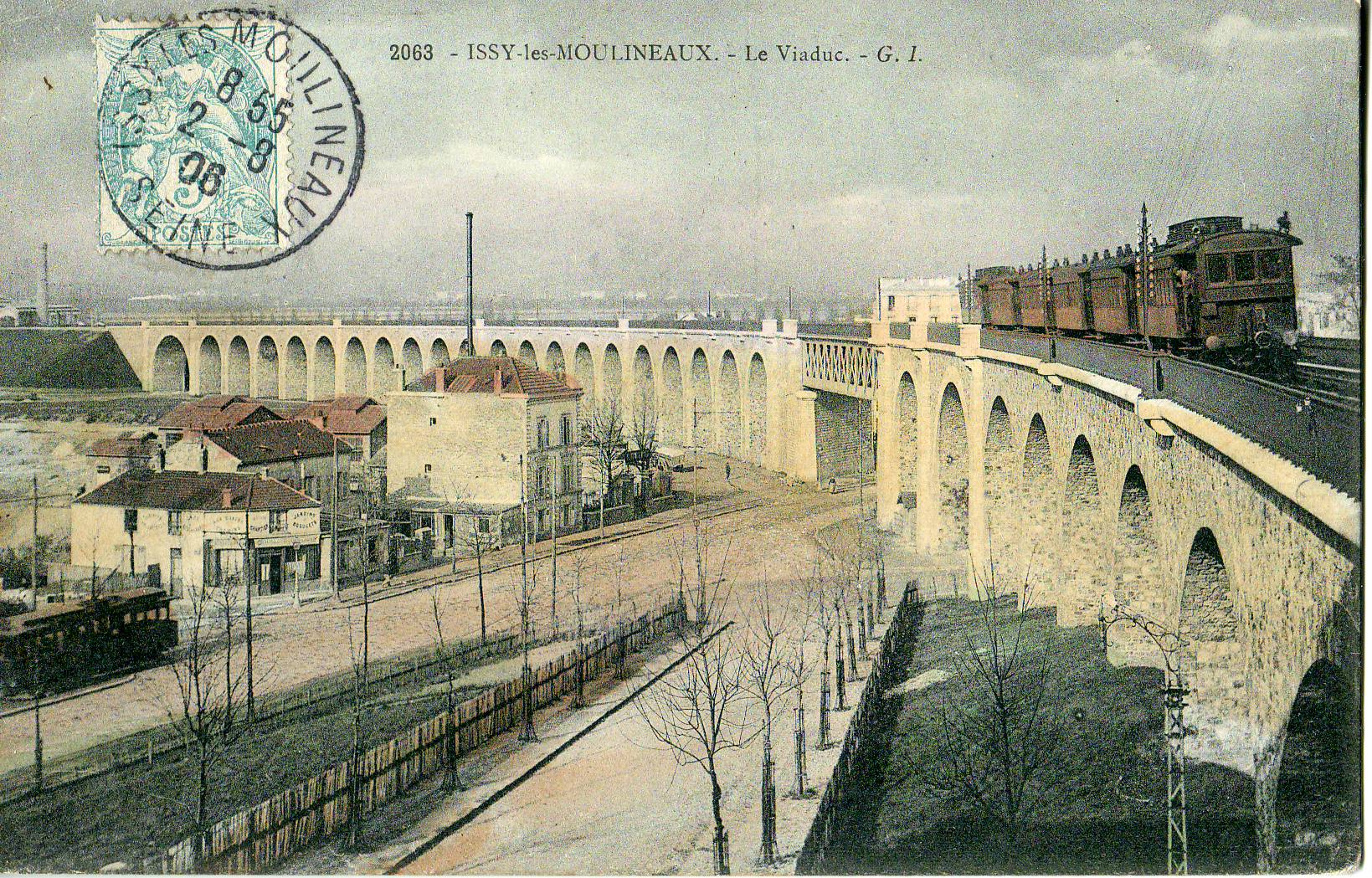 Carte postale ancienne éditée par GI N°2063Issy-les-Moulineaux : Le ViaducLe viaduc est édifié pour franchir le coteau des Montquartiers, au-dessus d’une entreprise aujourd’hui disparue, la Brasserie des Moulineaux.